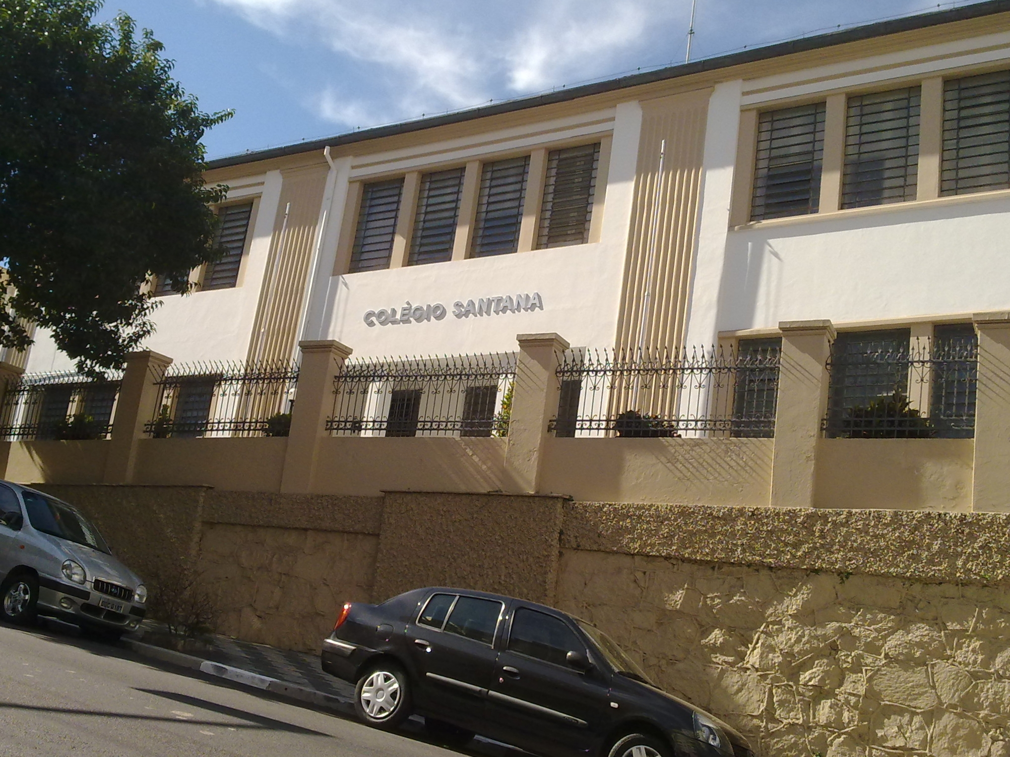 Foto do Colégio Santana, localizado no Alto de Santana, zona norte da cidade de São Paulo, BRASIL.